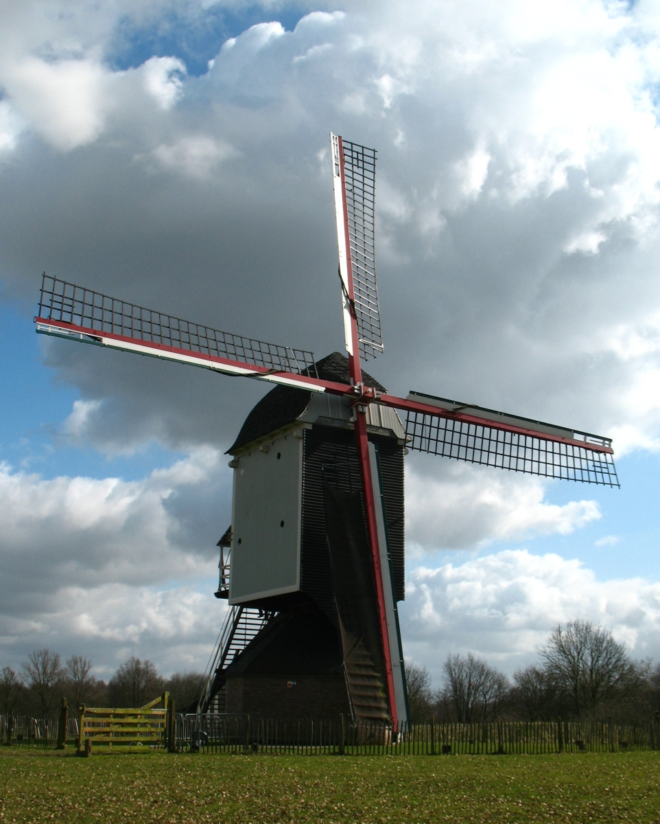 De Buulmolen te Olen, provincie Antwerpen